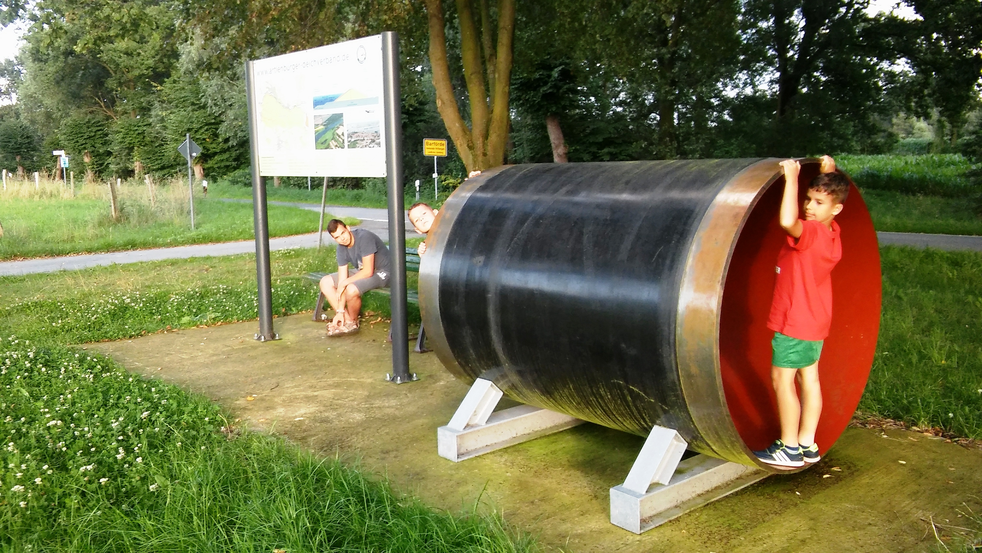 Barförde Norddeutsche Erdgasleitung Nordeuropäische Erdgasleitung NEL